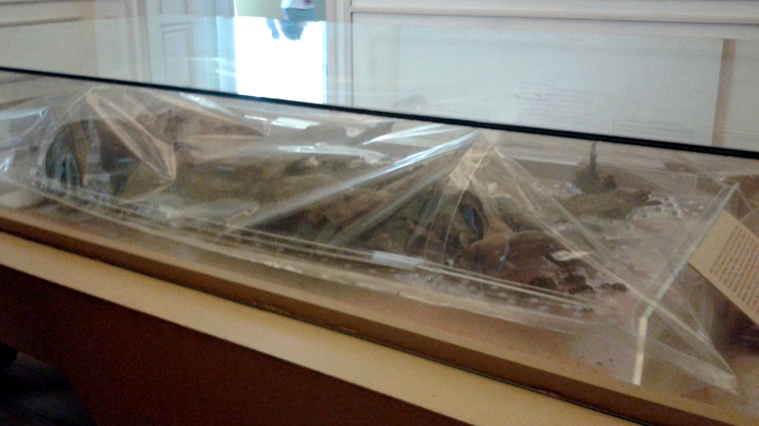 Corpo mumificado de mulher. Estatura em torno de 1,48 m e idade entre 24 e 26 anos. Foi encontrada junto a dois bebês e outros indivíduos de seu grupo na Caverna da Babilônia, na Fazenda de Santana, Município de Goiana, em Minas Gerais. Os corpos, conservados naturalmente graças às condições da caverna fria e seca onde foram sepultados, datam de aproximadamente 600 anos atrás, antecedendo, portanto, a chegada dos portugueses ao Brasil. As crianças têm respectivamente um mês e um ano de vida. Os corpos foram colocados sobre pedras, enrolados em cestas, redes, folhas e fibras. Junto a eles foram deixados objetos representativos de sua cultura, como bolsas trançadas em fibras, rede de dormir, uma corda grossa e uma "cruz" de fios, colocada sobre a cabeça da mulher. Pela análise dos objetos e do local onde o grupo foi encontrado, acredita-se que pertenciam ao ramo dos Botocudos, mais especificamente às etnias Maxacali, Kamakan ou Makuni. Estes corpos foram doados ao Imperador D. Pedro II por Maria José de SAntana, dona da fazenda onde foram encontrados, onde se plantava café na época. Hoje integram o acervo do Museu Nacional da UFRJ, no Rio de Janeiro.